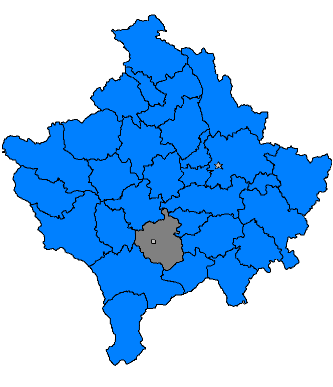 Suharekë, Kosovë 2006